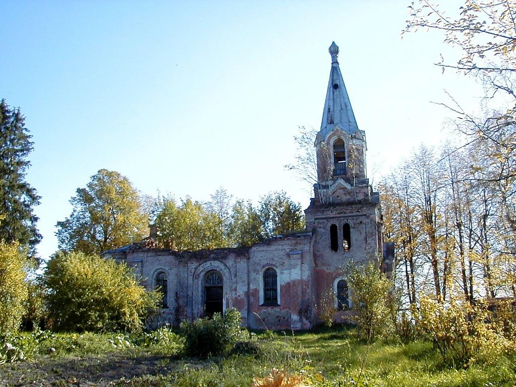 Umurgas (Pociema) Vissvētākās Dievmātes Aizmigšanas pareizticīgo baznīcaa drupas 2000-10-01